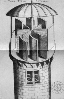 Verancsics Faustus: Machinae Novae - Szélmalom – a szélturbina első elképzelése